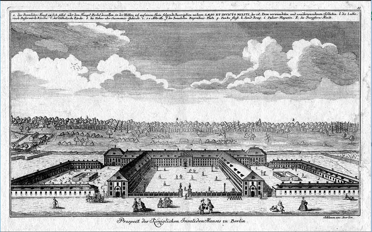 Ansicht des Invalidenhauses von Osten; 1750 (Johann David Schleuen)